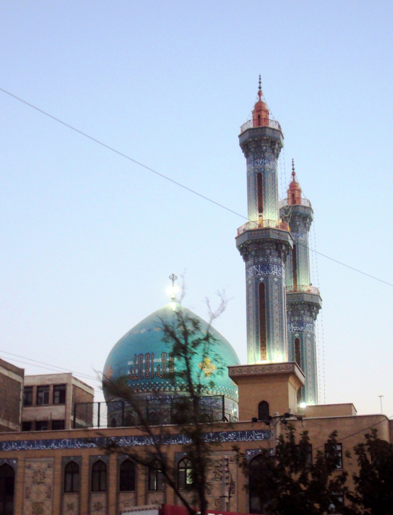 مسجد الغدیر قم